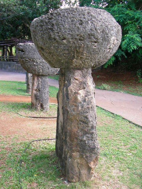 Latte stones in Latte Stone Park, Hagatna, Guam